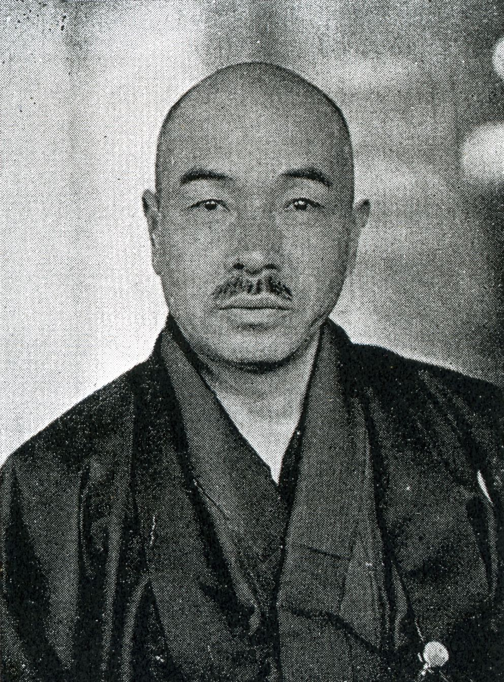 この写真は、野村嘉六（1873-1952）の写真です。